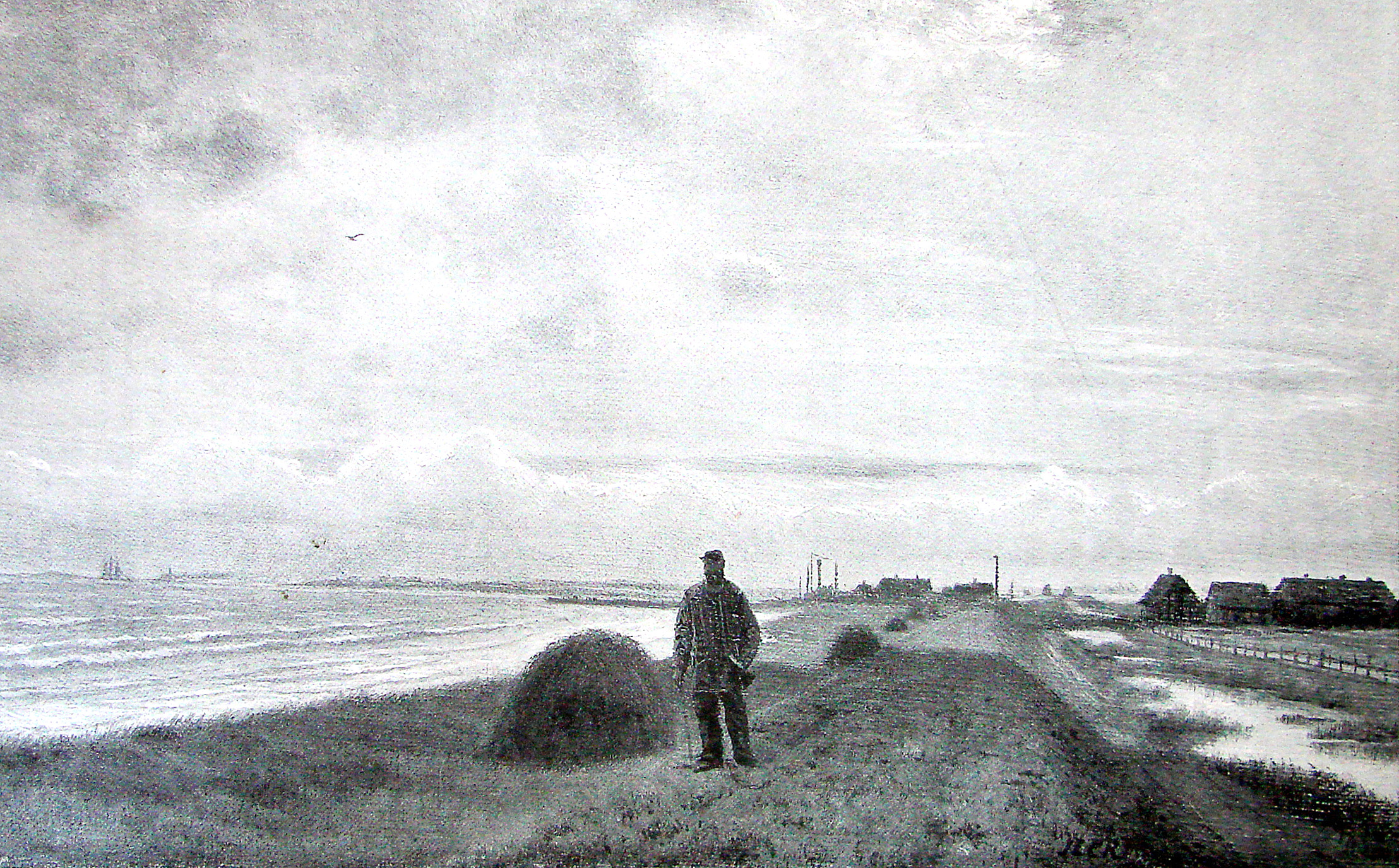 Dige ved Kramnitse på Lolland i 1800-tallet